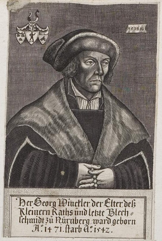 Grafik aus dem Klebeband Nr. 3 der Fürstlich Waldeckschen Hofbibliothek Arolsen Motiv: Georg Winckler (1471–1542), Blechschmied u. Ratsherr in Nürnberg